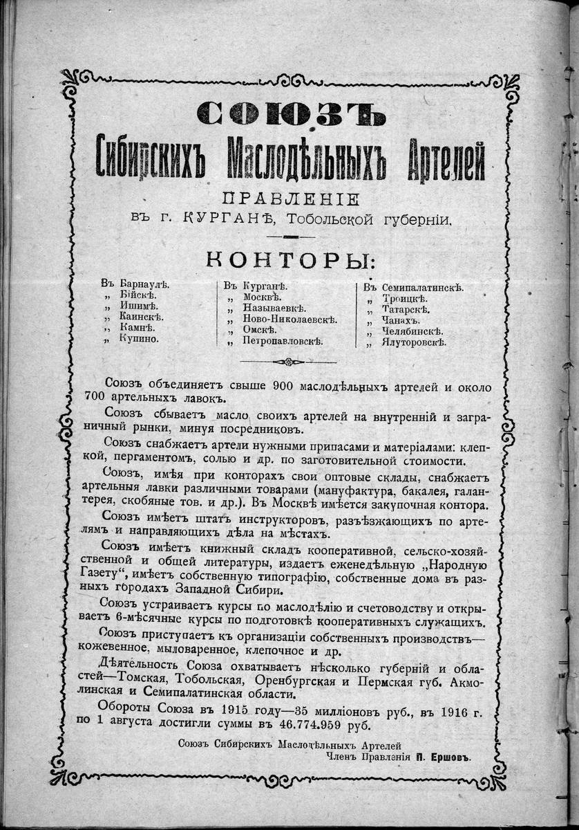 Информация о Союзе сибирских маслодельных артелей, после 1916 года